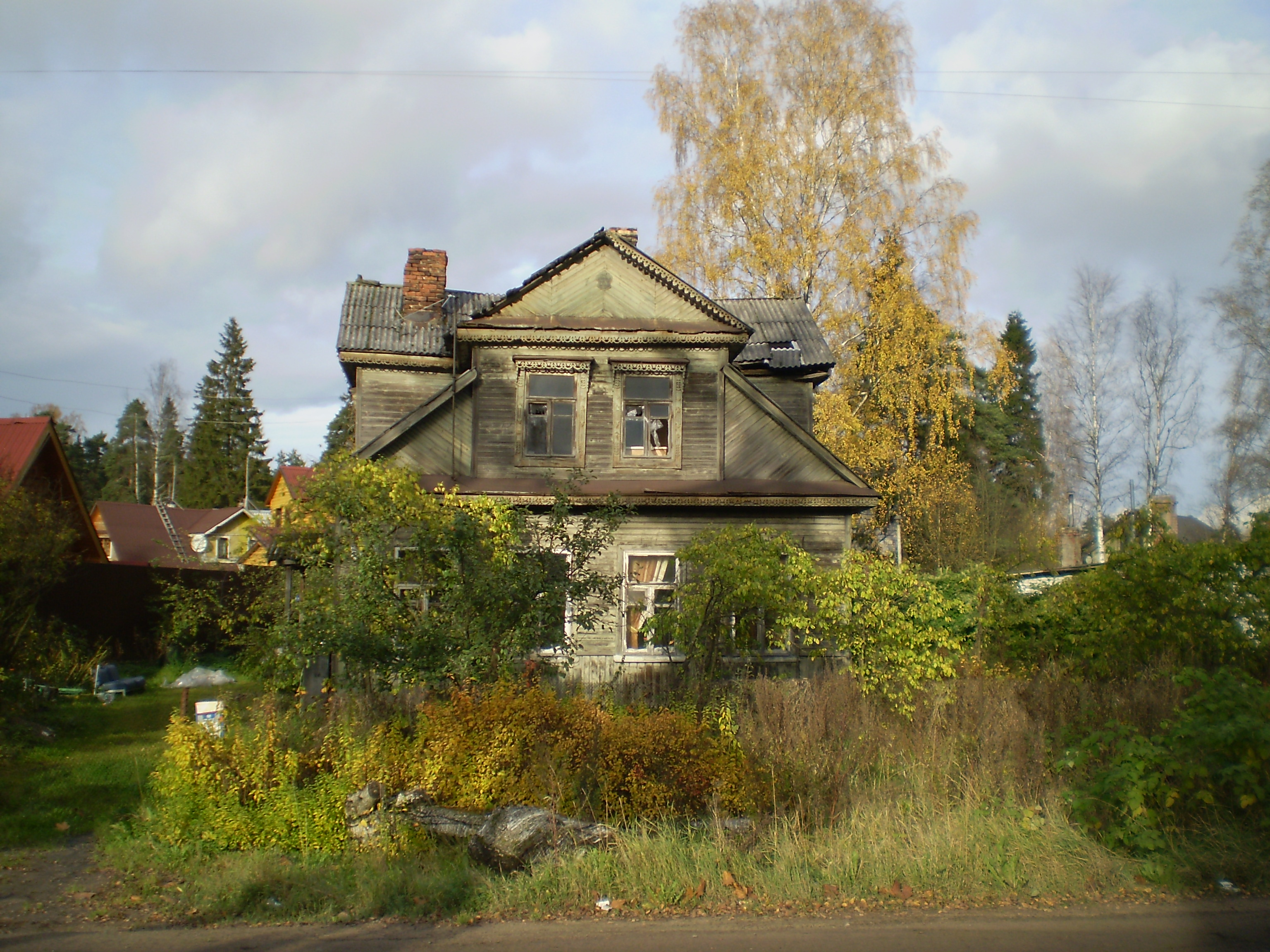 Самый старый дом в микрорайоне Мельничный Ручей, города Всеволожска. На фронтоне дома находится табличка: «Застрахован в 1896 году»